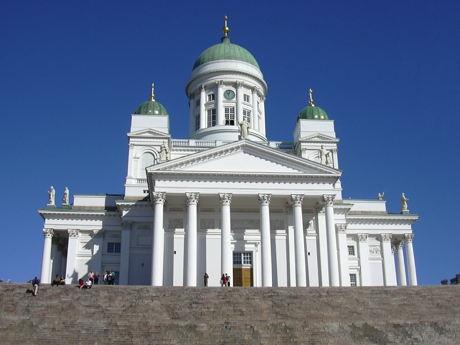 Katedrála v Helsinkách.